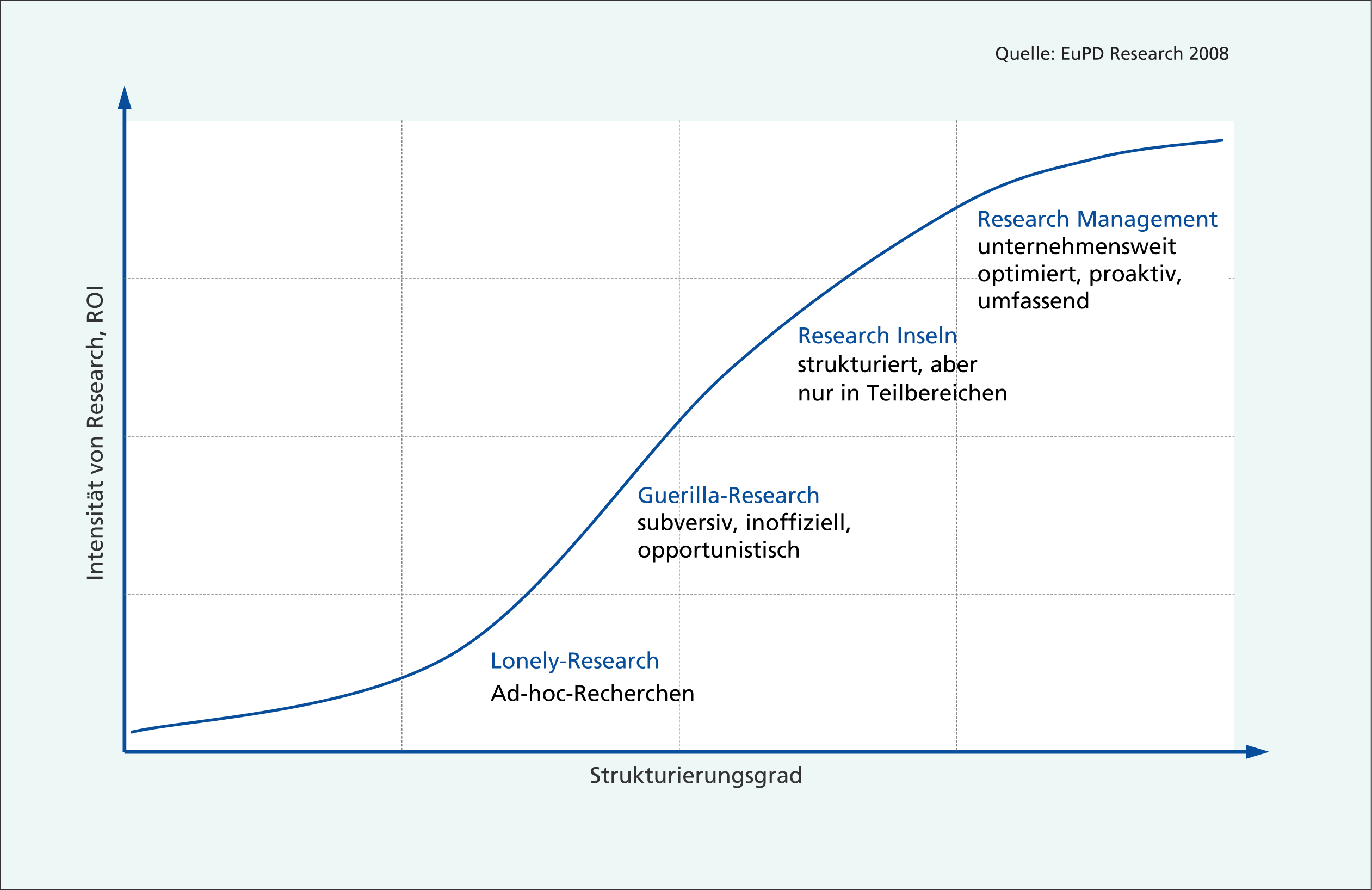 Evolutionsstufen betrieblicher Marktforschung